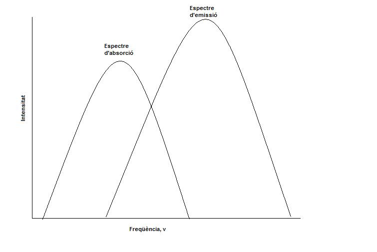 Espectré d'emissió-absorció referent a la teoría de Förster